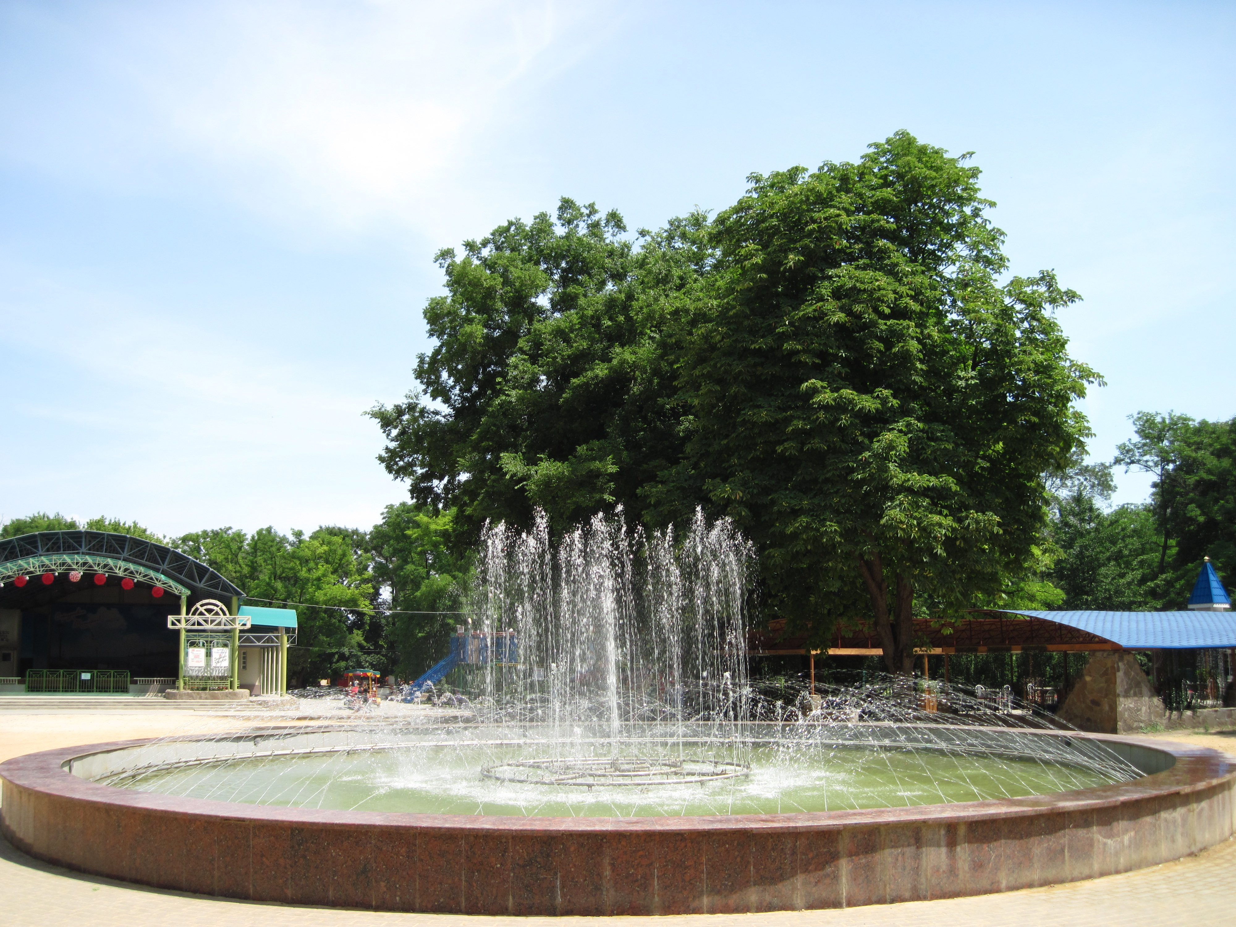 парк им. Горького, город Таганрог, Ростовская область, Россия